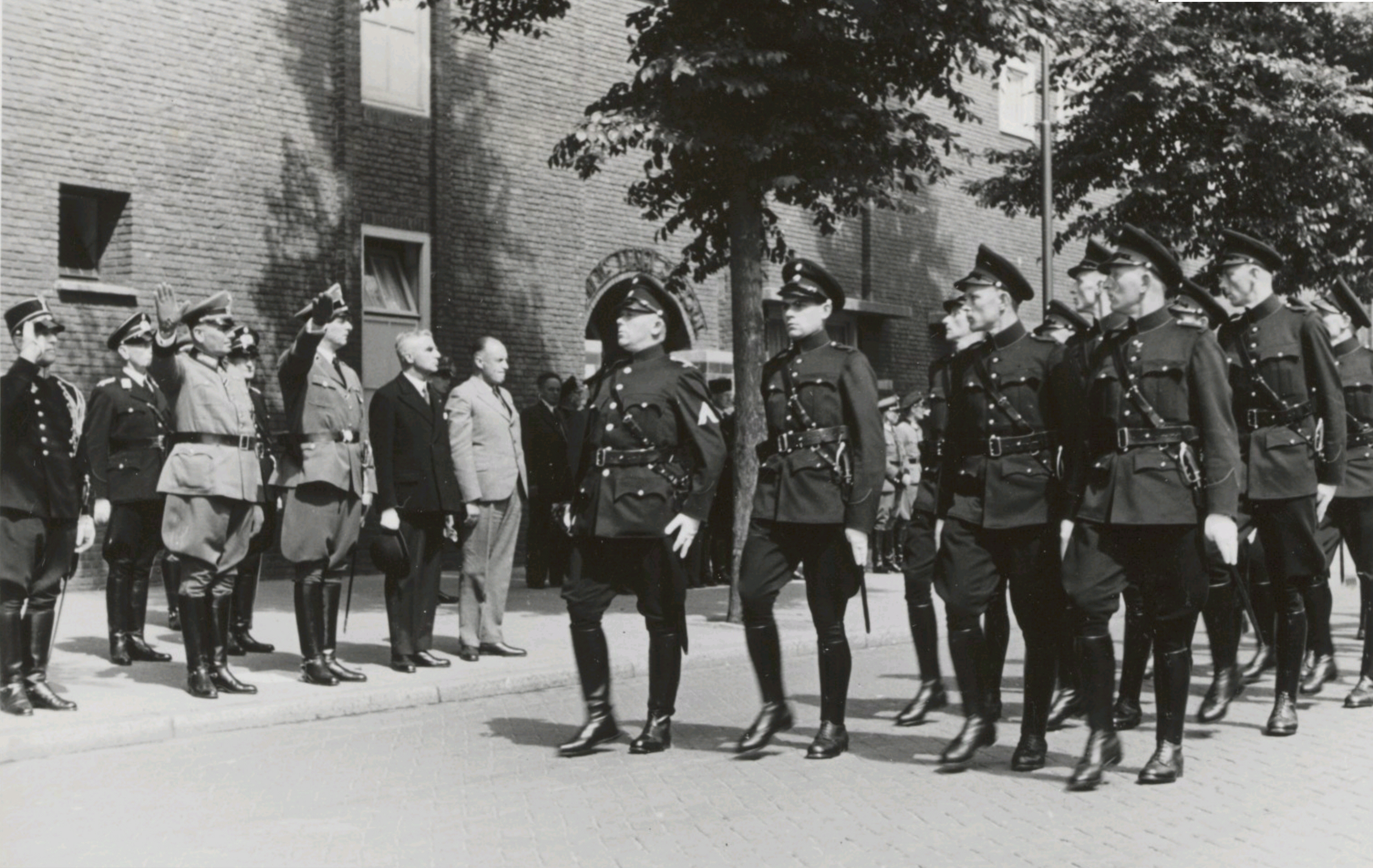 "Opening van de nieuwe politiekazerne op het Cornelis Troostplein (hoek Ferdinand Bolstraat) te Amsterdam. Politiemannen trekken voorbij. Van rechts naar links; senator dr. Böhmker (sic), E.J. Voûte, burgemeester van Amsterdam, Brigadeführer Rauter, generaal Schumann en commissaris van politie S. Tulp"